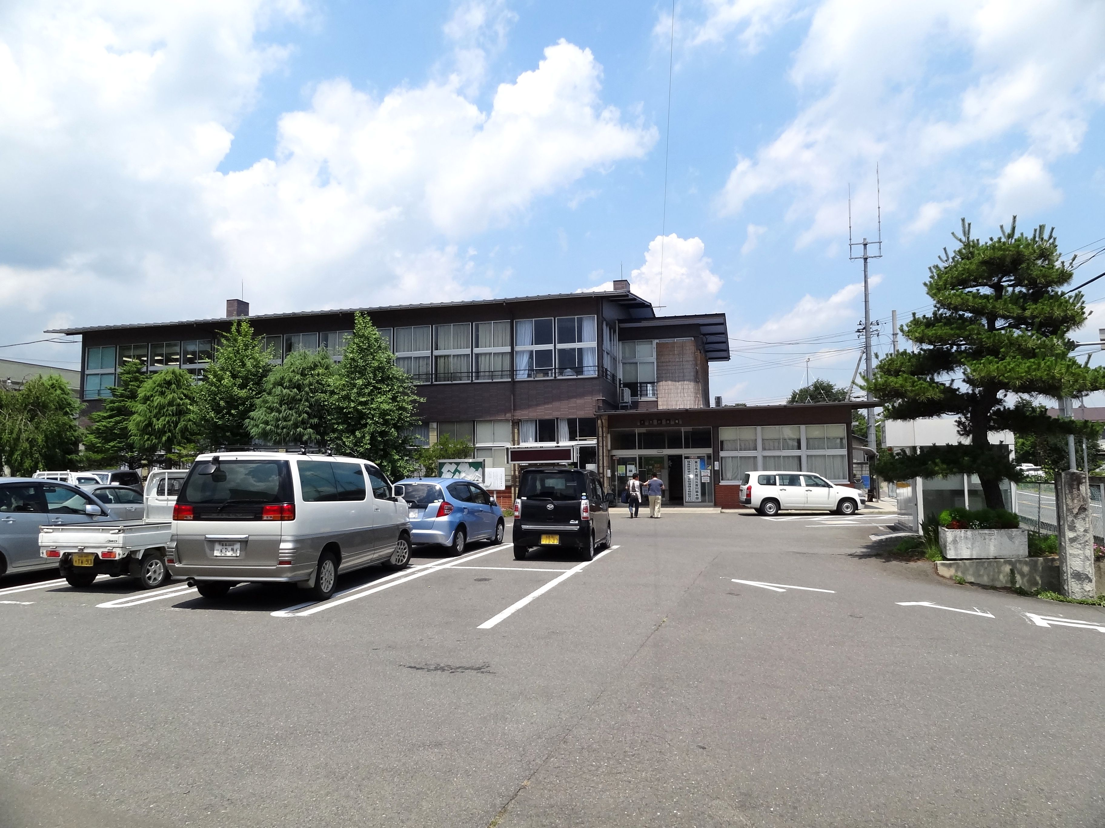 大玉村役場